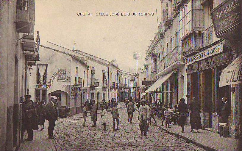 Ceuta. Calle José Luis de Torres (actual calle Real). Principios del siglo XX.